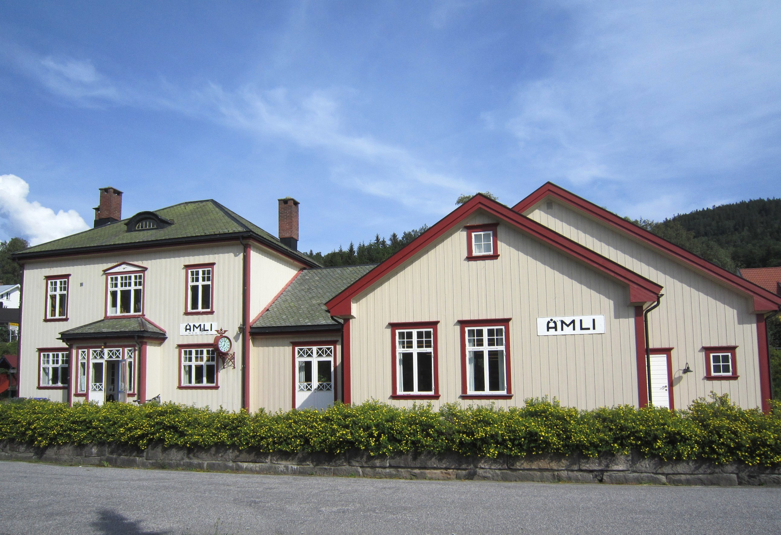 Den tidligere stasjonsbygningen på Åmli huser per 2011 det lokale folkebiblioteket.